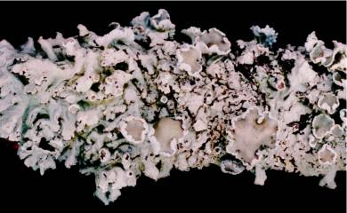 Imshaugia placorodia